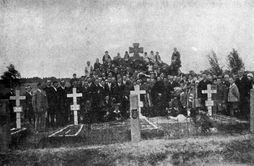 Панахида по С. Петлюрі на «Козацькій Могилі» в Олександрові-Куявському, уряджена відділом У.Ц.К.